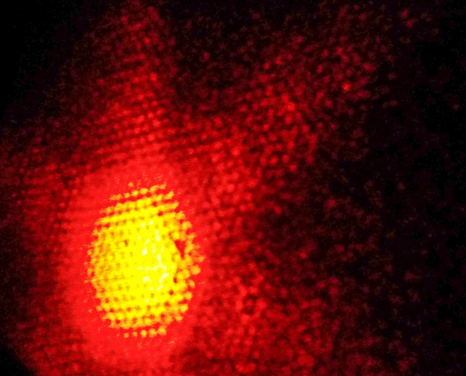 Láser difractado usando una lente y una rendija en forma de hexagono. Foto tomada en el laboratorio de óptica de la facultad de ciencias de la unam.